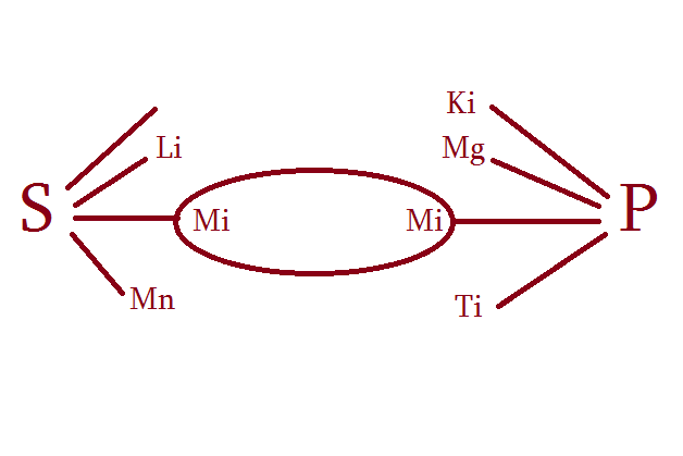 Կոնստելյացիայի տեսություն